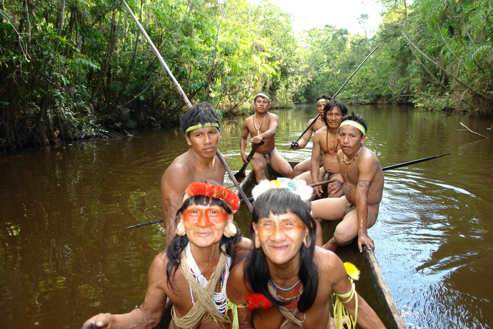 Cayapas navegando